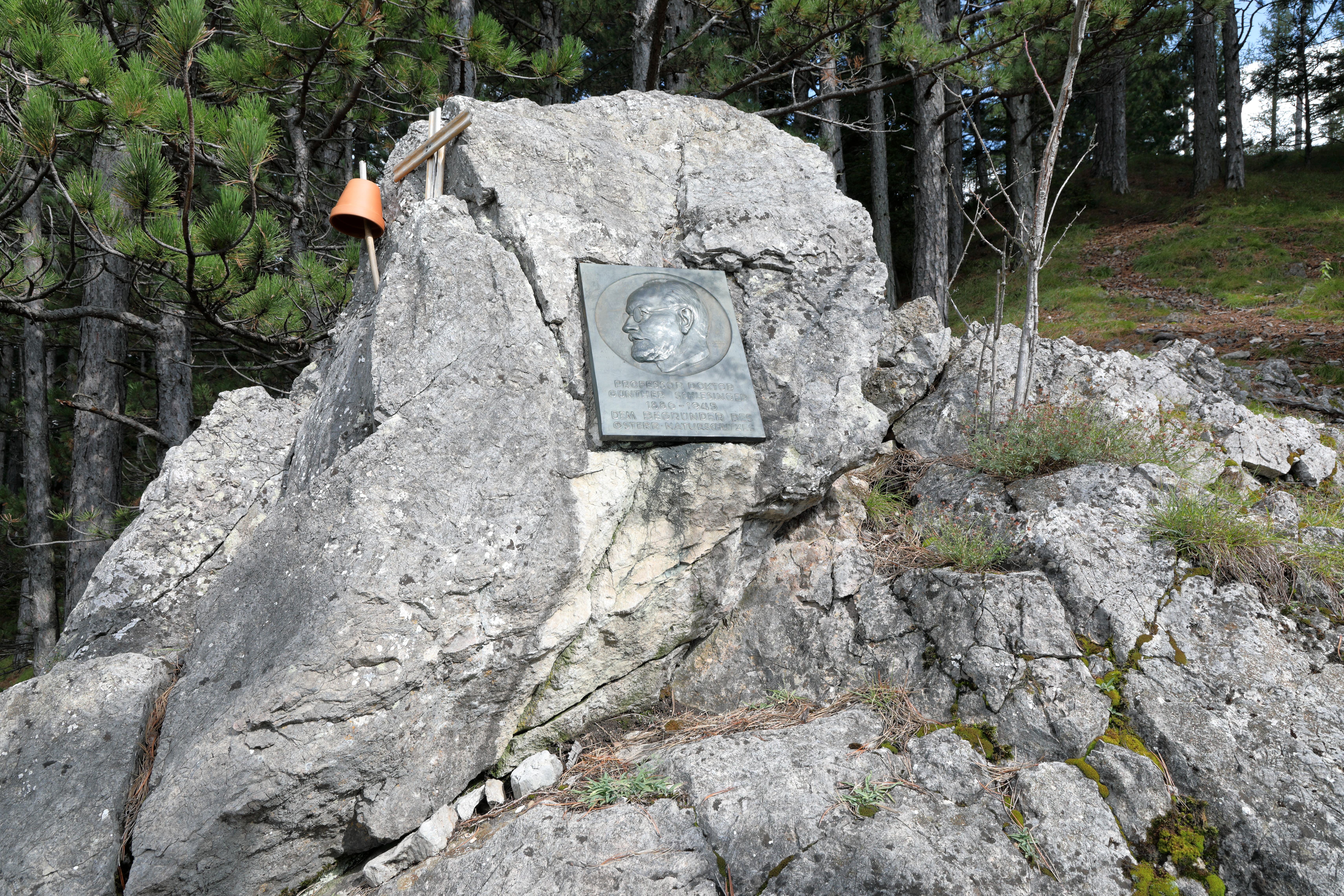 Die Günther-Schlesinger-Gedenktafel auf dem Himberg in der niederösterreichischen Marktgemeinde Puchberg am Schneeberg. Die Tafel wurde von dem Bildhauer Rudolf Schmidt 1952 geschaffen und kurz vor dem Gipfel auf dem 948 m hohen Himberg an einem Felsen angebracht.